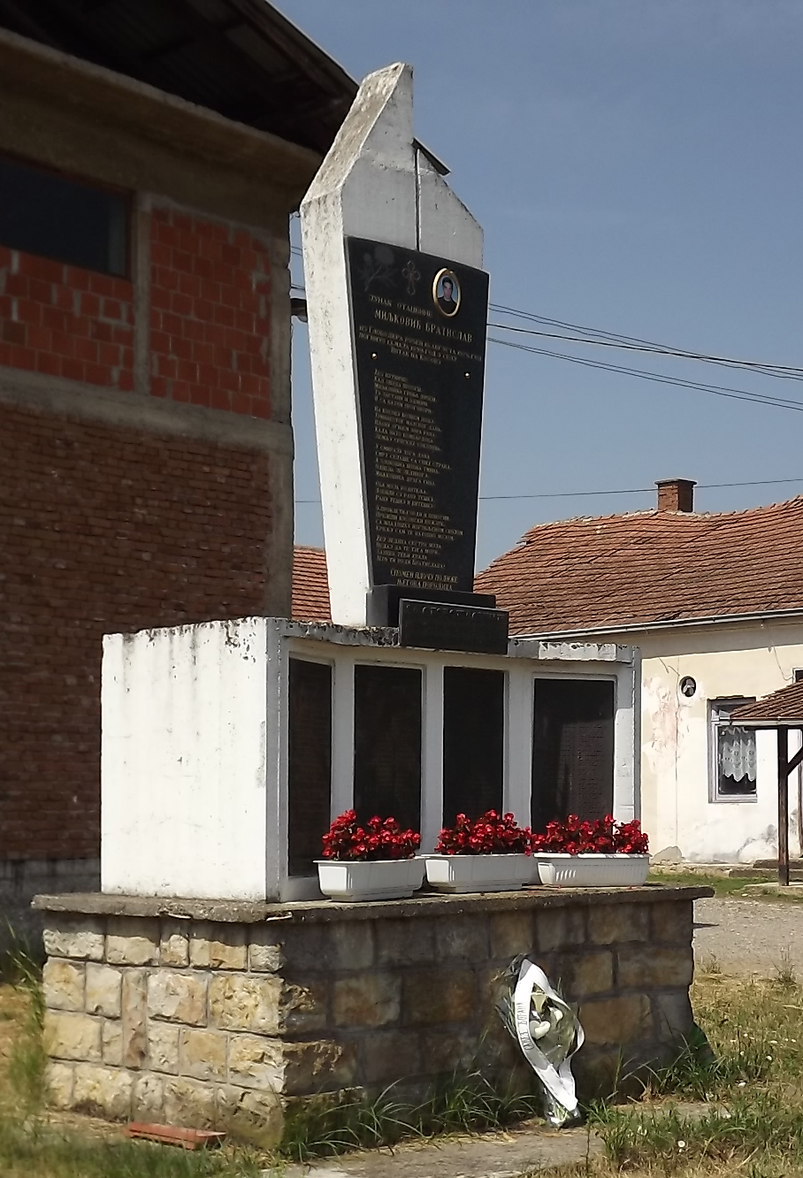 Spomenik borcima u oslobodilačkim ratovima, selo Globoder. Fotografija nastala u okviru saradnje Narodnog univerziteta Trstenik, Narodne biblioteke Jefimija i Saveza boraca Trstenik.